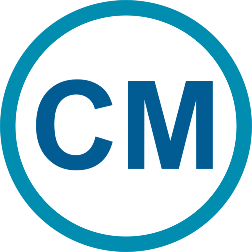 千葉都市モノレールのナンバリング記号